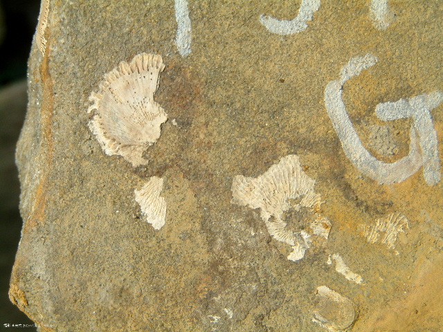 含貝殼的唭哩岸岩（李榮文拍攝，2003）